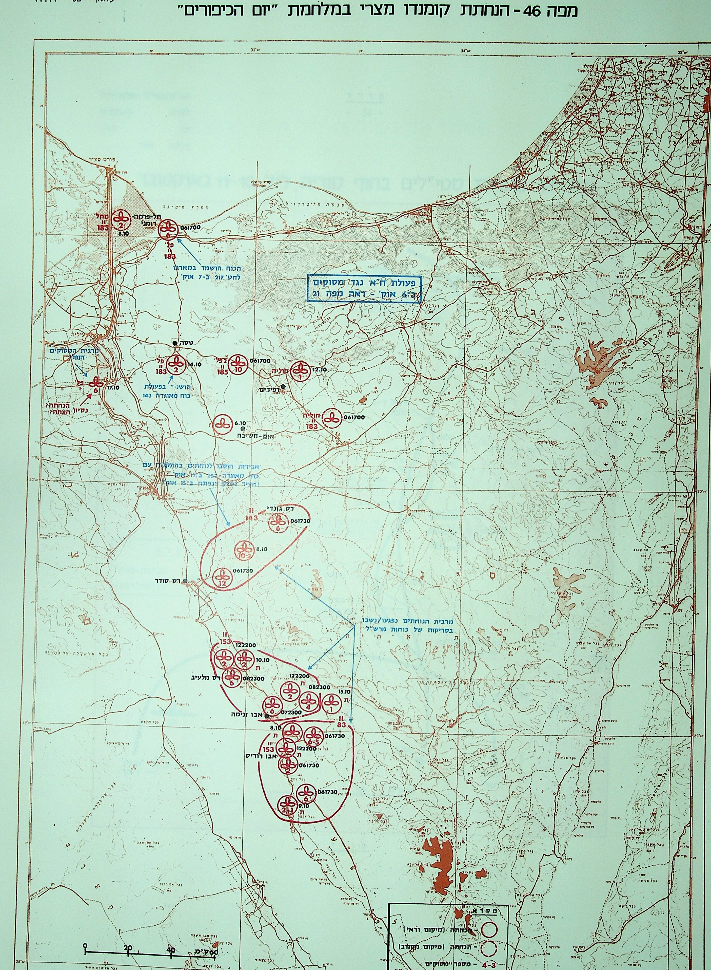 הנחתות קומנדו מצרי במלחמת יום הכיפורים - מתוך אטלס מלחמת יום הכיפורים